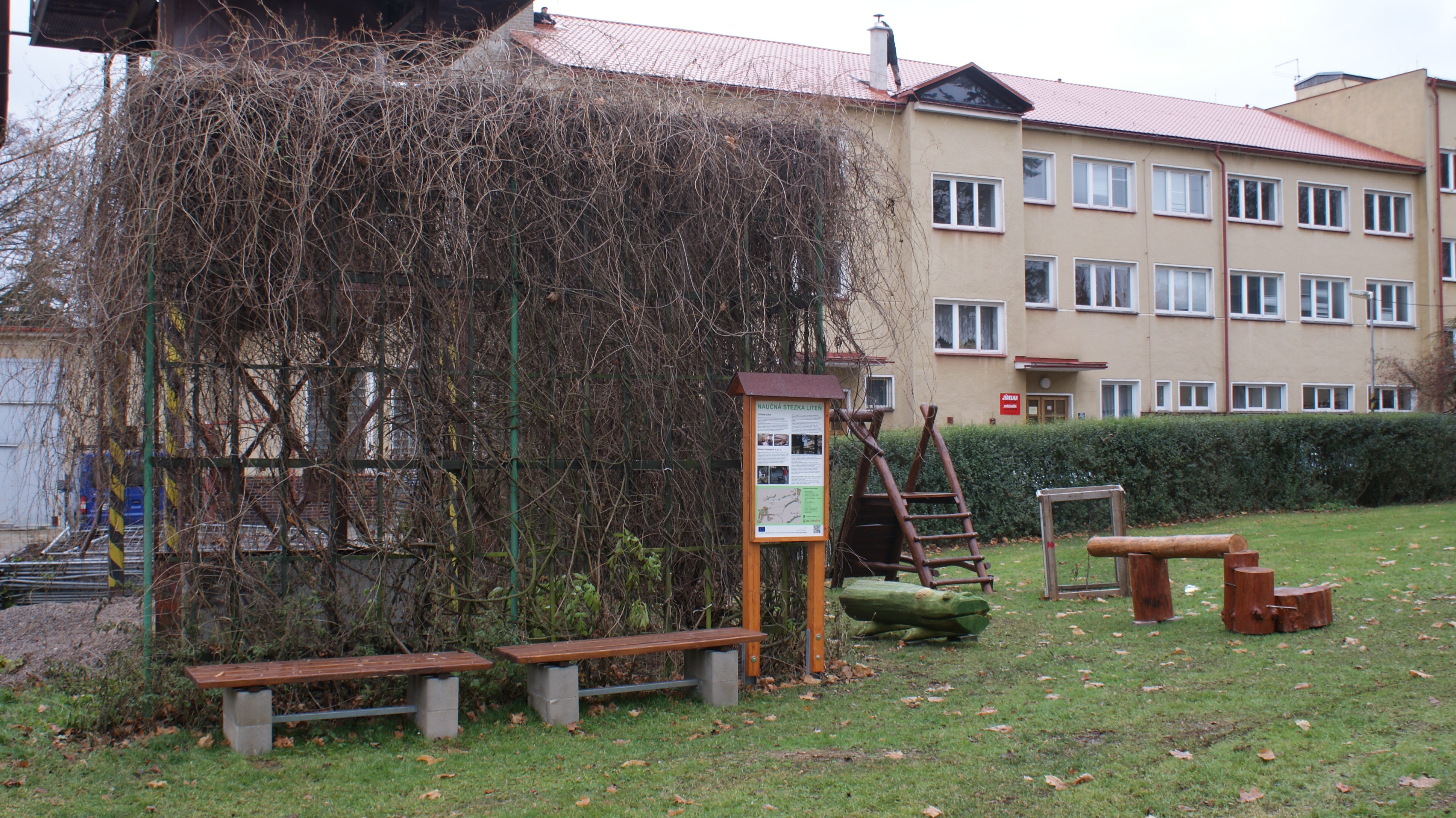 Pohled ve směru západ východ na zastavení Naučné stezky Liteň v Areálu Pode Zděmi. Informační panel, lavička. Dětské hřiště vpravo je využívané dětmi ze sousední Mateřské školy a dětmi účastnícími se celodenních akcí v Areálu (Kováři v Litni, Liteňfest, Zimní běh Litní. Za zastavením je budova školy bývalého učiliště.)